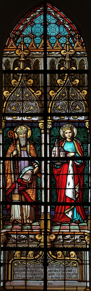 Glasraam in de Sint-Jozefskapel, gemaakt door Leopold Pluys (Mechelen) in 1888. Gift van Martinus Van Moll en Joanna Nuyens.